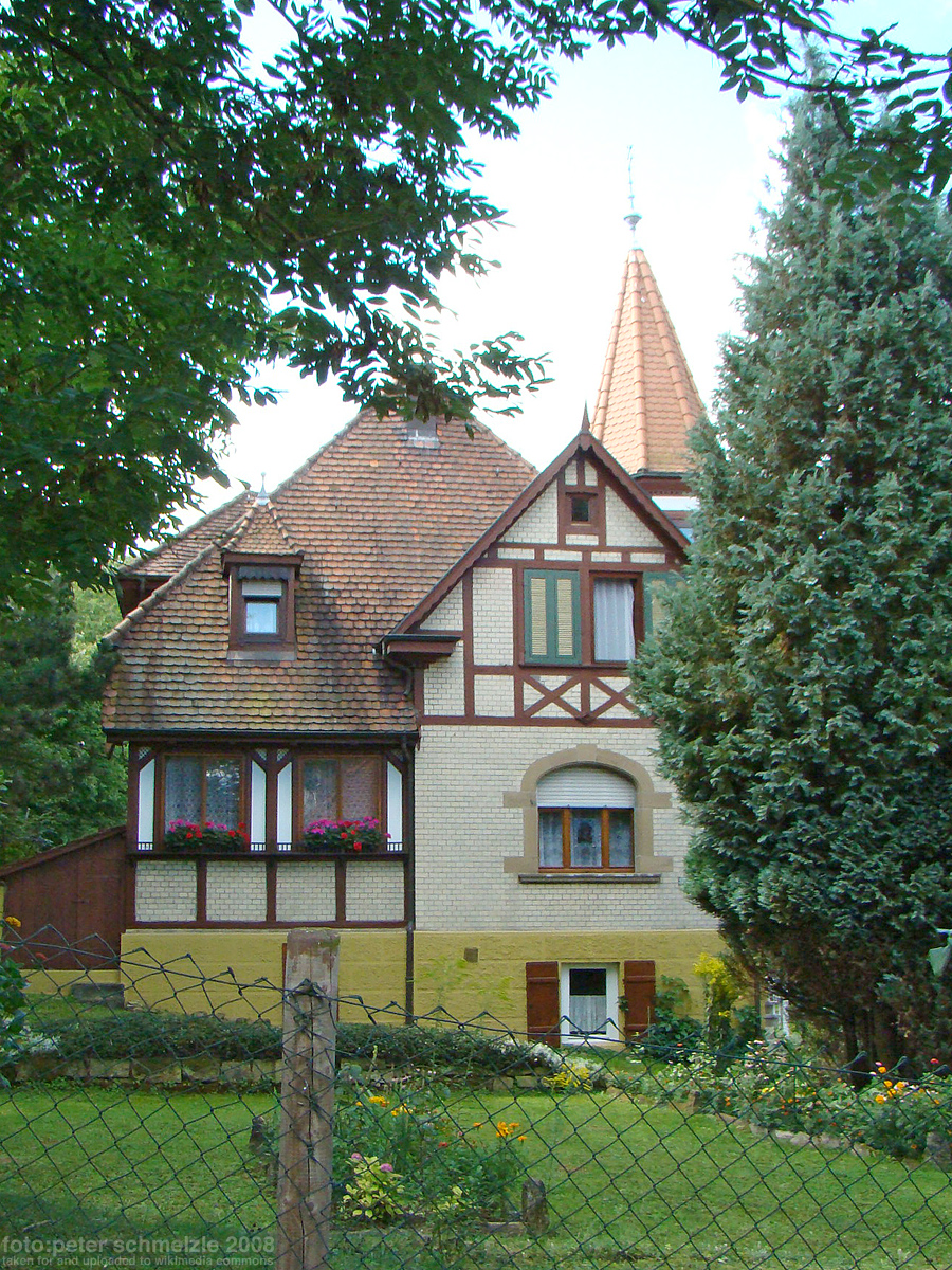 Denkmalgeschütztes Gebäude Heuchelbergstr. 89 in Heilbronn-Böckingen